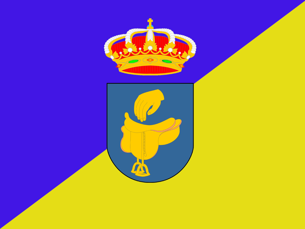 Bandera de Mansilla de las Mulas